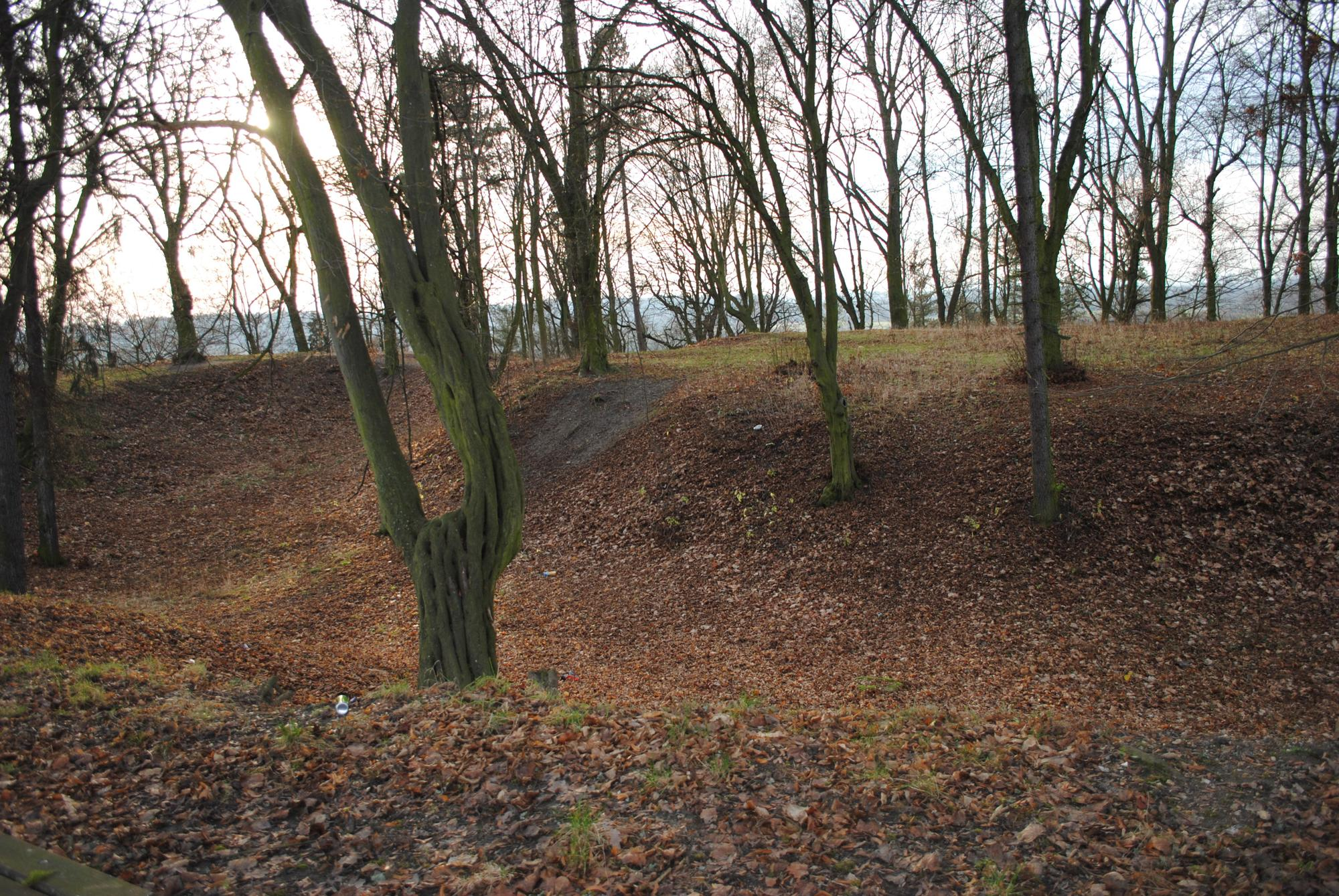 Reste der Burganlage in Kynšperk nad Ohří